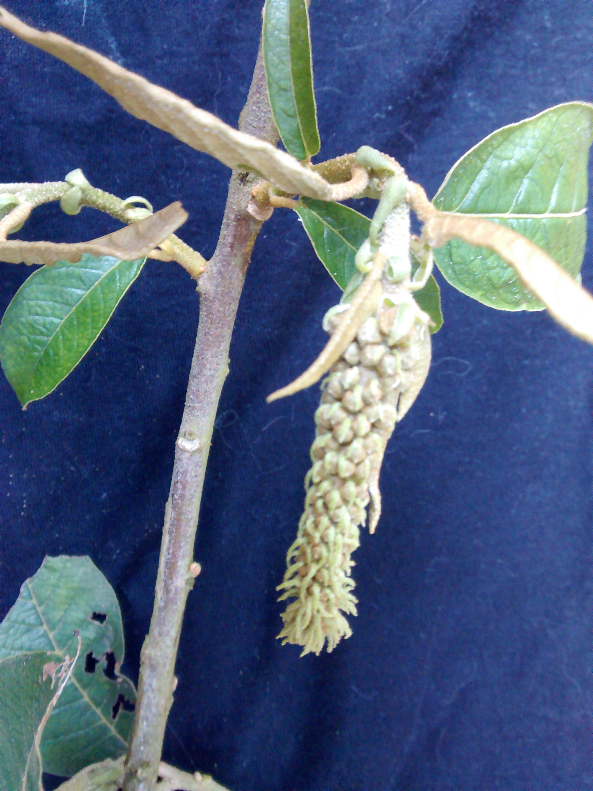 Inflorescência de Croton floribundus em Piedade - SP